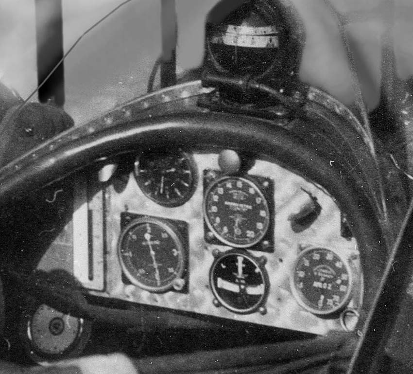 Tablica przyrządów litewskiego samolotu szkolnego ANBO-V.